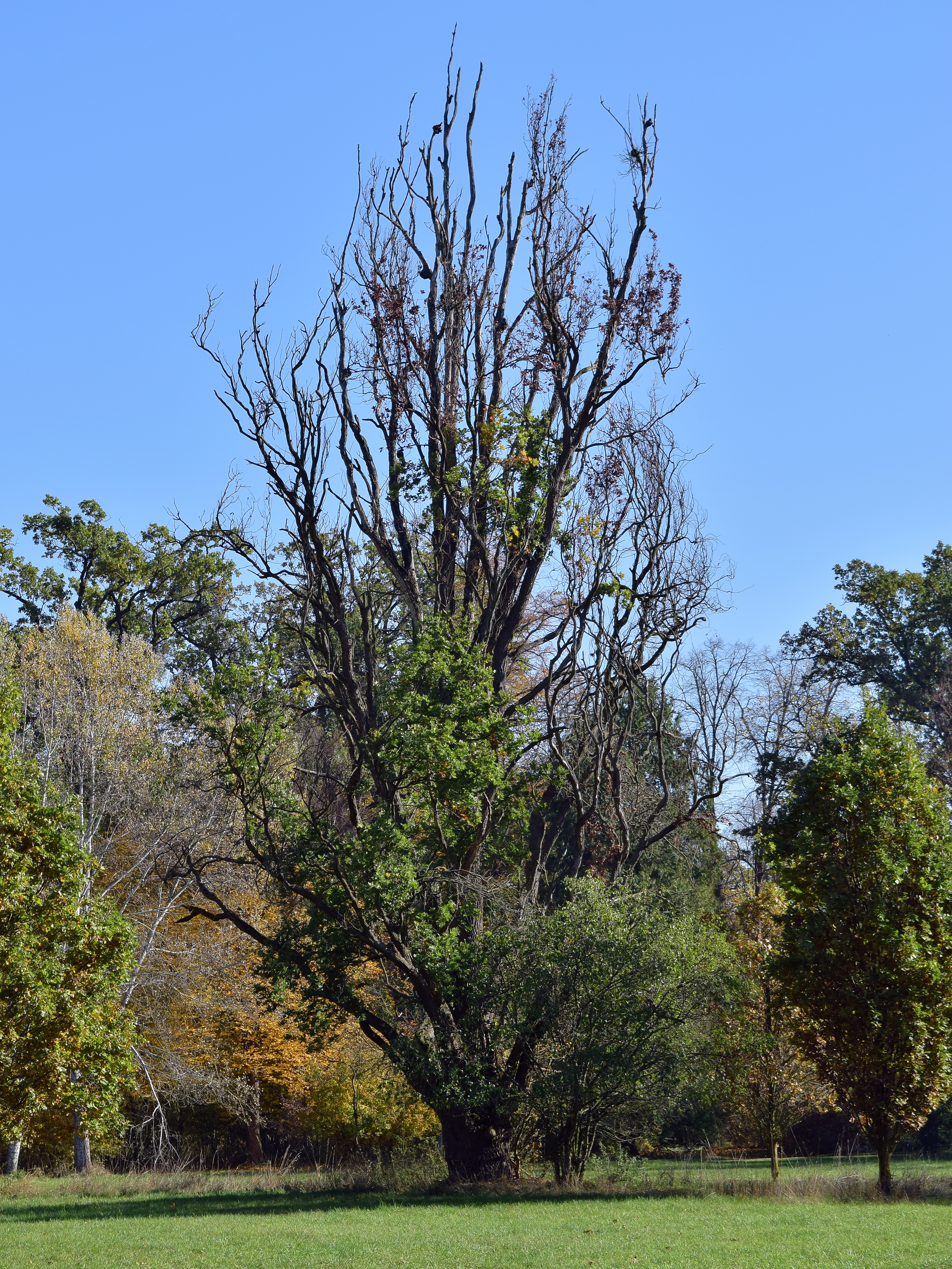 Säuleneiche im Schlosspark Grafenegg. Der "wertvolle Baumbestand" des Schlossparks wird vom Denkmalschutz explizit erwähnt.